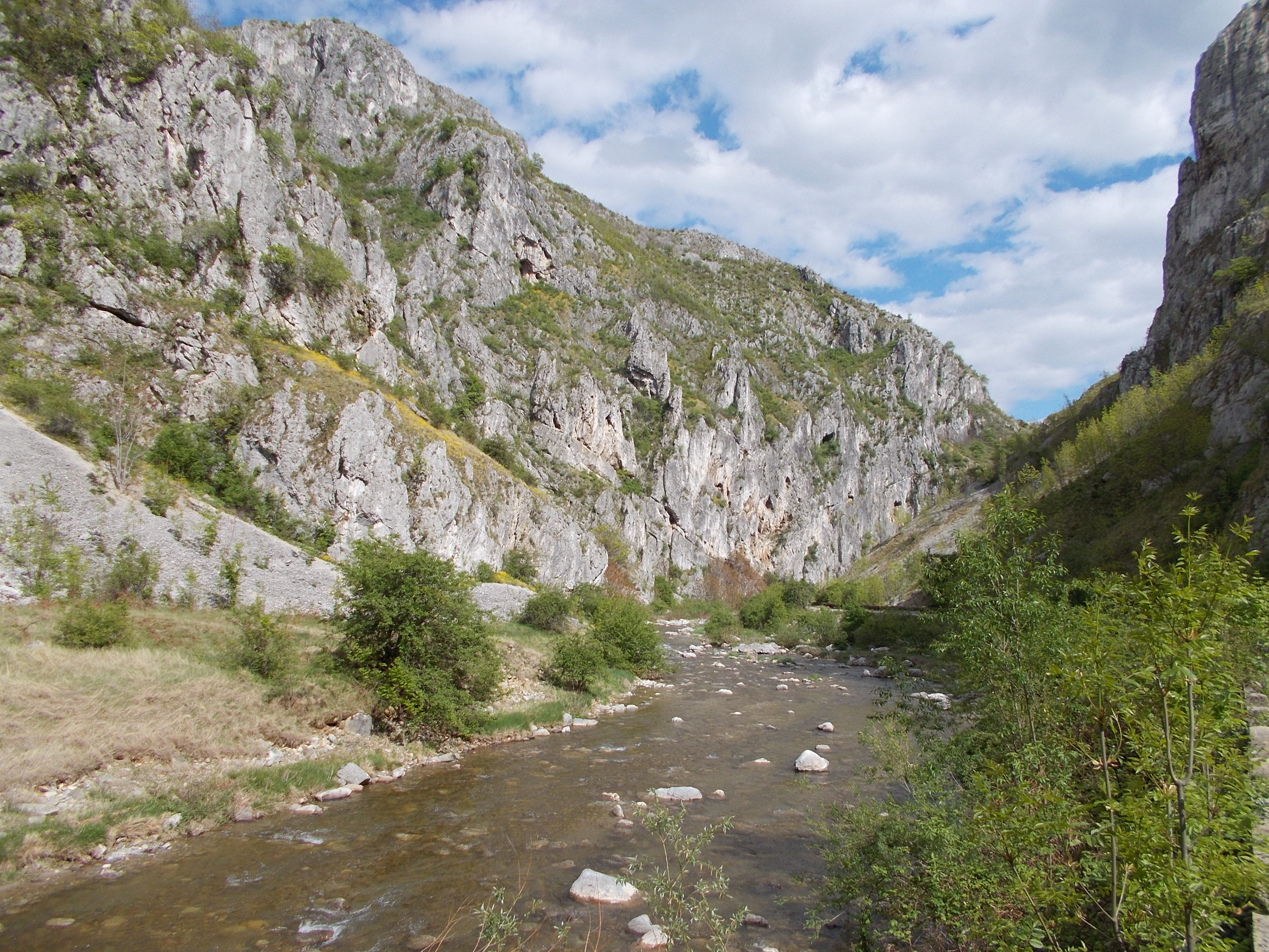 Cheile Sohodolului, arie protejată (de interes național) aflată în județul Gorj, pe teritoriul administrativ al comunei Runcu.